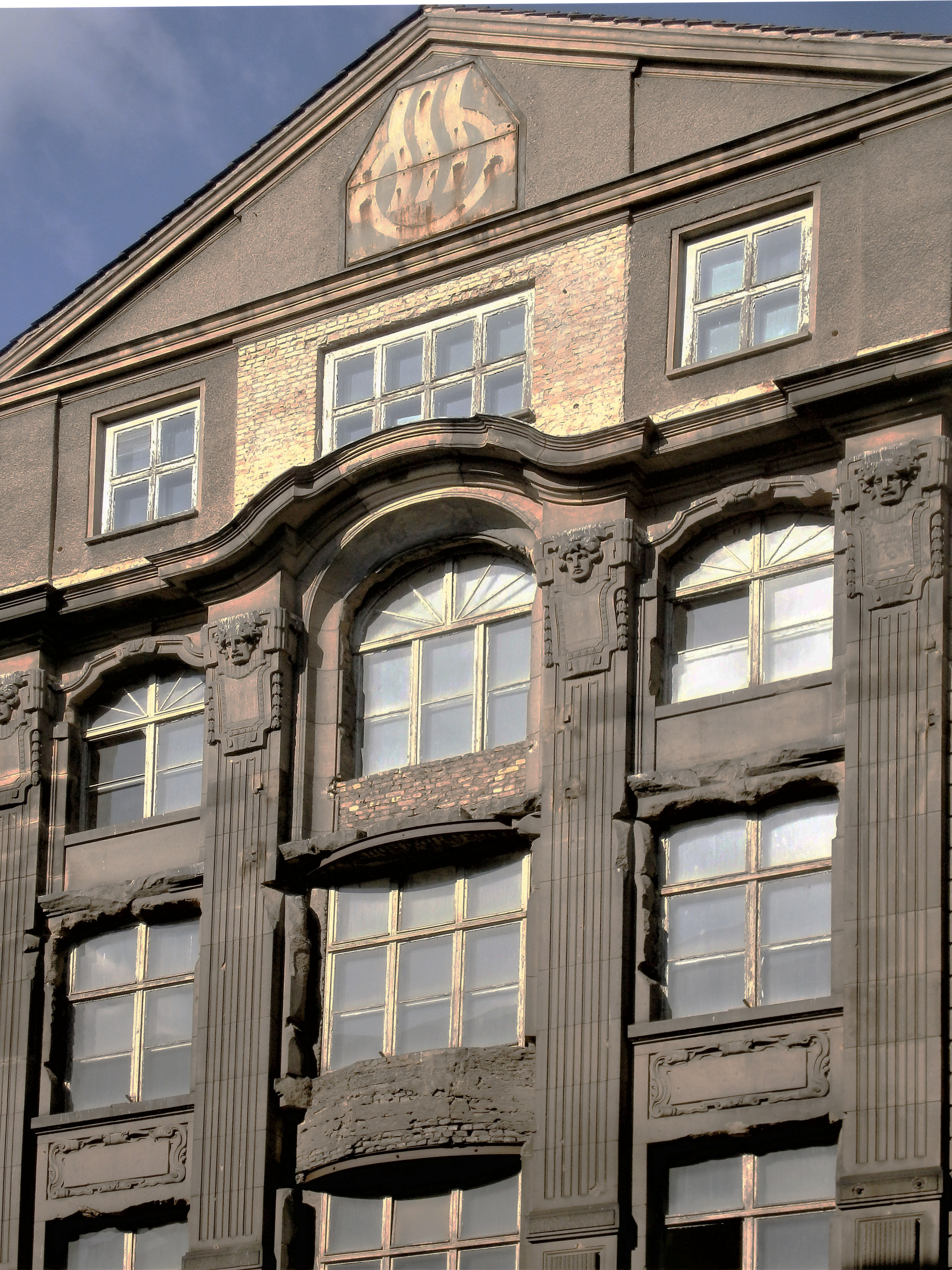 Die Andreasstraße ist eine Straße im Berliner Bezirk Friedrichshain-Kreuzberg, Ortsteil Friedrichshain. Angelegt wurde sie 1862 auf vorherigen Gartenland und 1863 benannt. Bis um 1900 waren die Grundstücke bebaut und bis 1930 wurde verdichtet. Bei Luftangriffen im Zweiten Weltkrieg wurde die Gebäude schwer getroffen. So ist die Straße seit den 1950er Jahren mit wiederhergestellten Altbauten, aber besondres durch Plattenbau-Wohnblöcke aber seit 1990 auch durch Hotel- und Bürobauten im Umfeld des Ostbahnhofs charakterieisiert. Das Bild zeigt: Mittelrisalit und Giebel mit LOGO der VVB Schienenfahrzeugbau der DDR am Verwaltungsbau Andreasstraße 71/73.